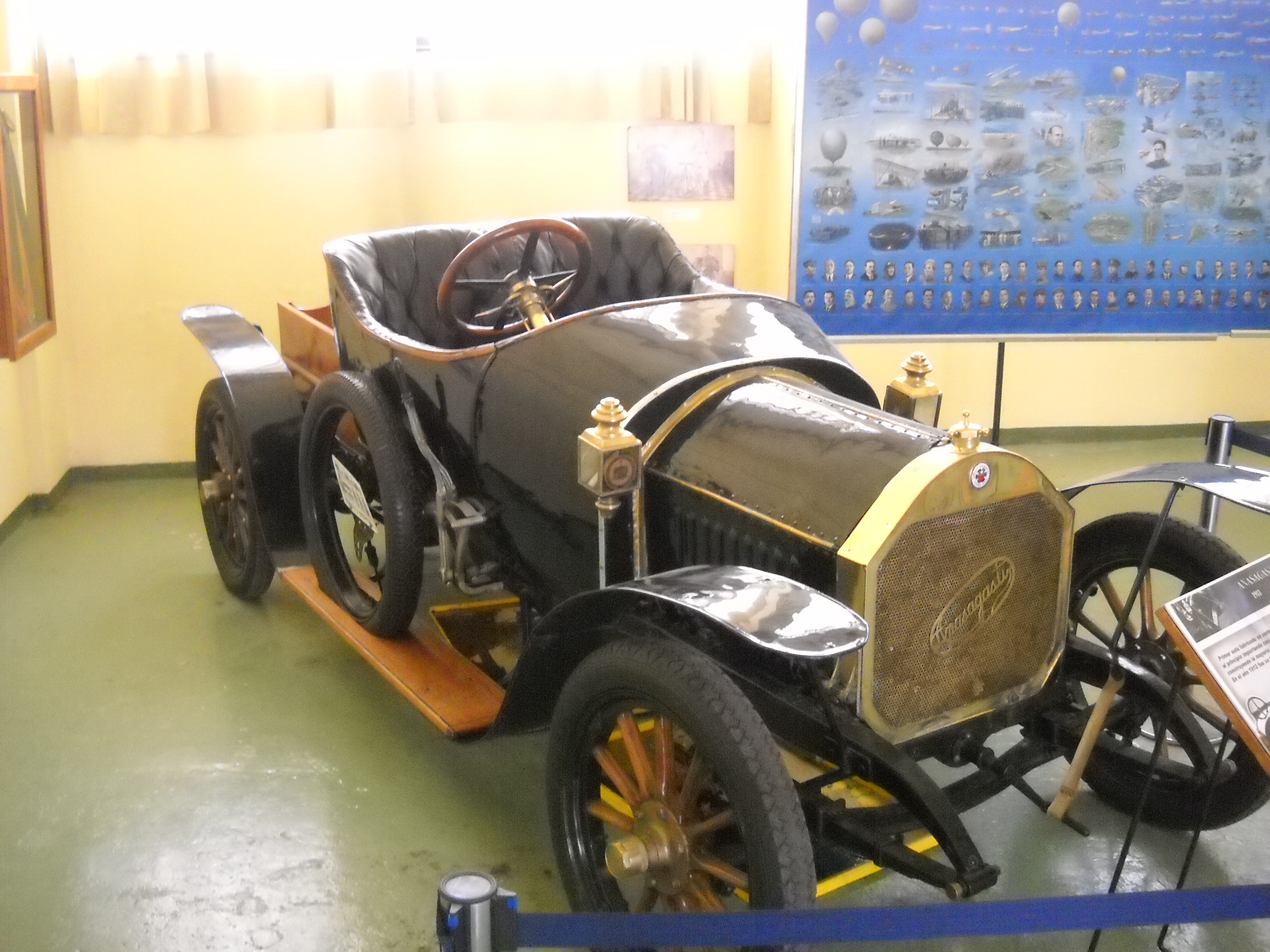 Automovil Anasagasti, preservado y en exposición en el Museo Nacional de Aeronáutica de Argentina. Fueron fabricados por el ingeniero argentino Horacio Anasagasti de 1912 a 1914.